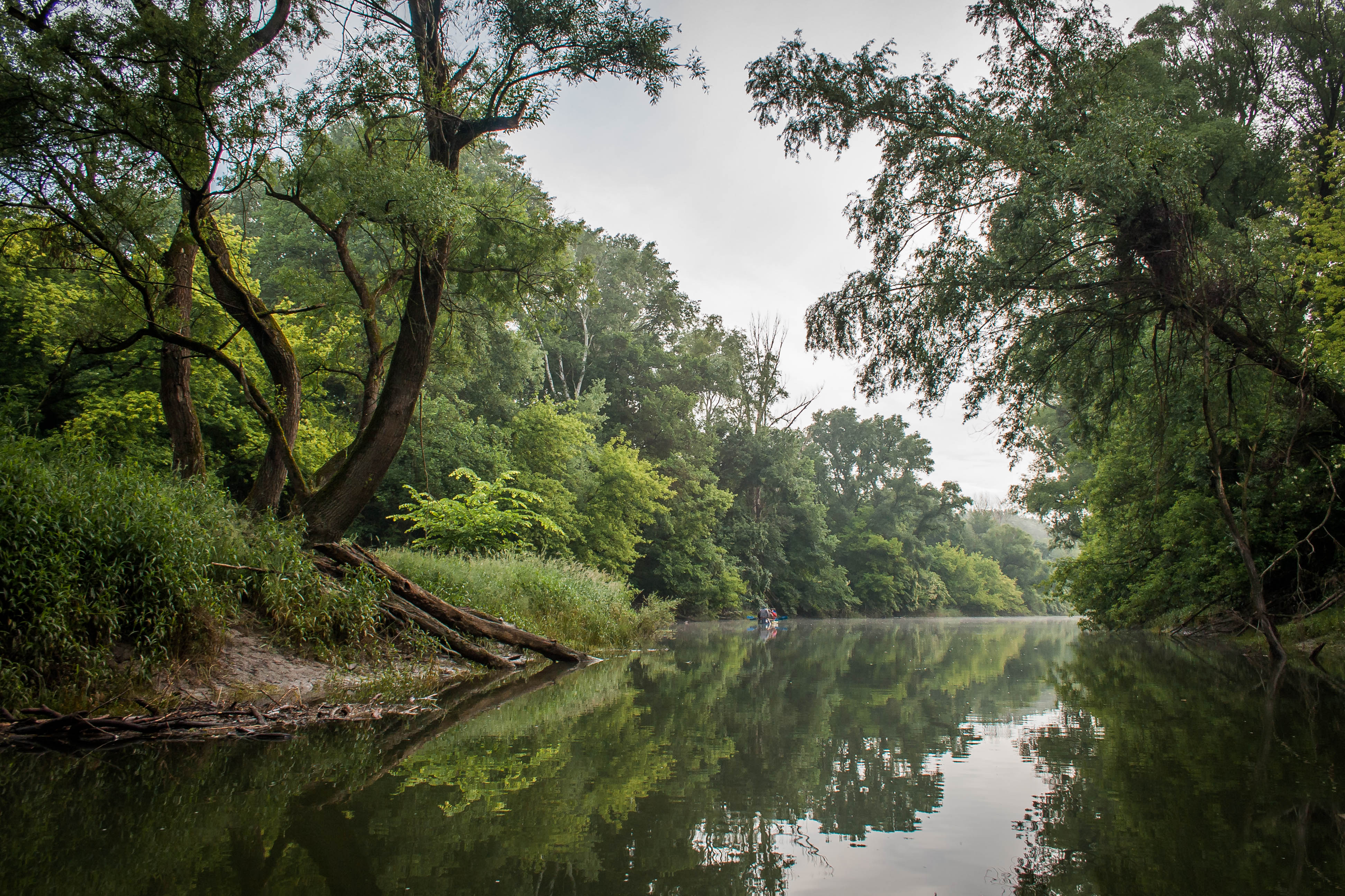 Die Hainburger und Stopfenreuther Au ist eine naturbelassene Flusslandschaft an der Donau nahe Hainburg in Niederösterreich, östlich von Wien, und seit 1996 Teil des Nationalparks Donau-Auen. Hainburger and Stopfenreuther Au is a natural river landscape on the Danube near Hainburg in Lower Austria, east of Vienna, and since 1996 part of the National Park Donau-Auen This file shows the National Park Donau-Auen in Austria.